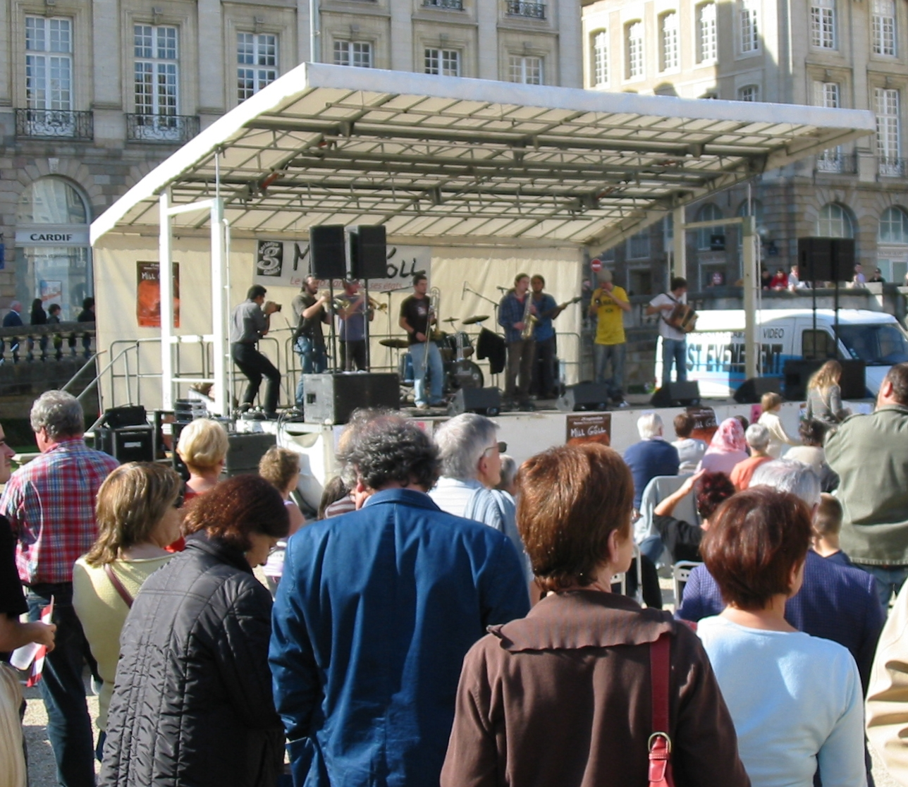 Sonneurs à la Fête Mill Góll en Pays Gallo 2007